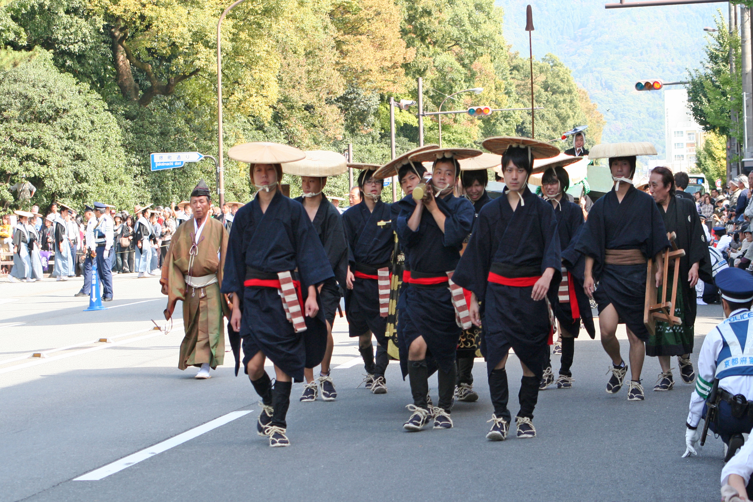 京都府京都市にて開催された時代祭。正午の御所から平安神宮までの行進の様子。2009年10月22日撮影。